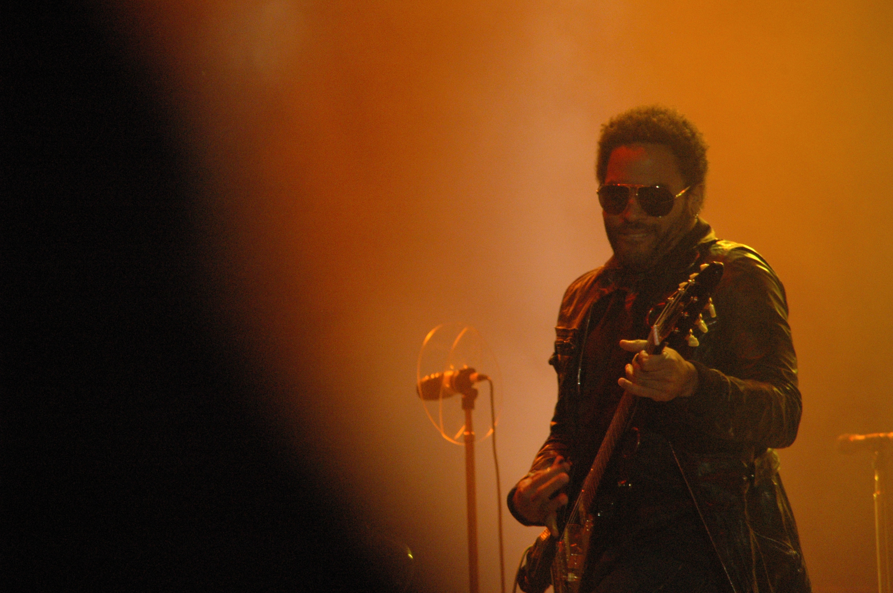 Lenny Kravitz at Open Air St. Gallen, June 27, 2008